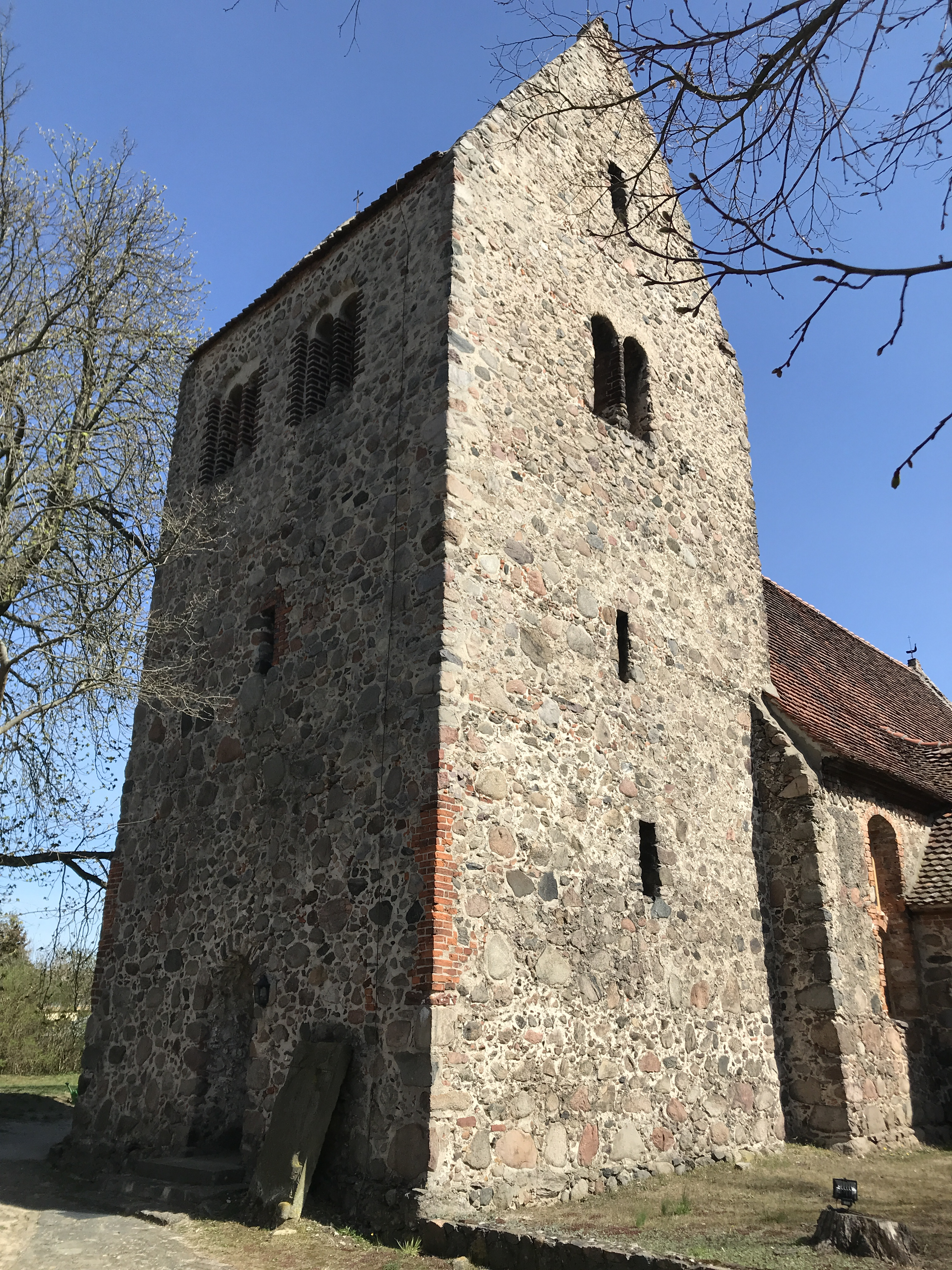 Die Dorfkirche Zaue ist eine spätromanische Feldsteinkirche in Zaue, einem Gemeindeteil von Ressen-Zaue der Gemeinde Schwielochsee im Landkreis Dahme-Spreewald. Im Innern hängt unter anderem ein Taufengel, den Tobias Mathias Beyermann im Jahr 1720 schuf.